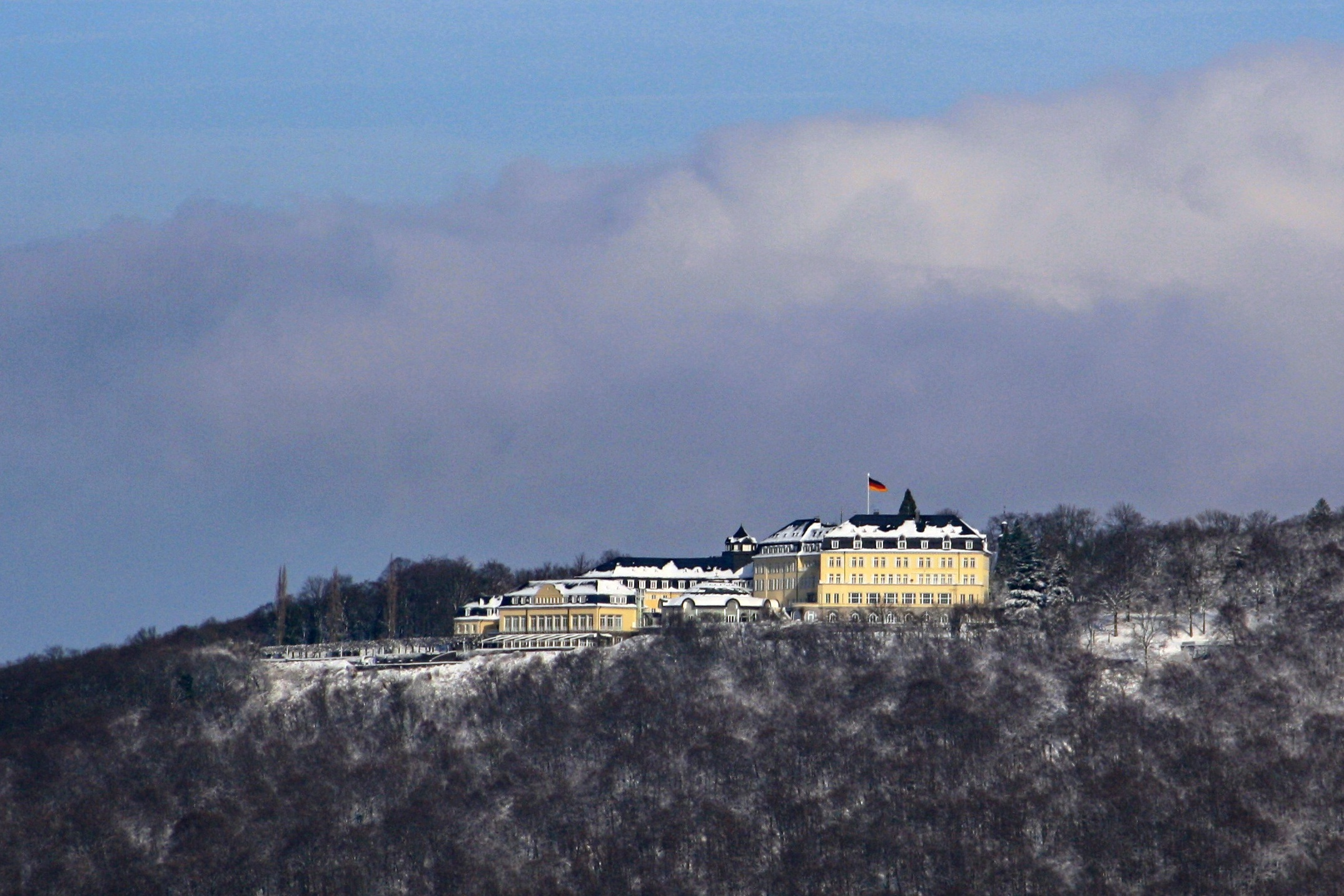 Blick vom Rodderberg auf den Petersberg